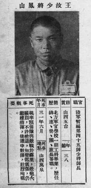 中文（台灣）: 抗戰軍人忠烈錄第一輯中的烈士遺像